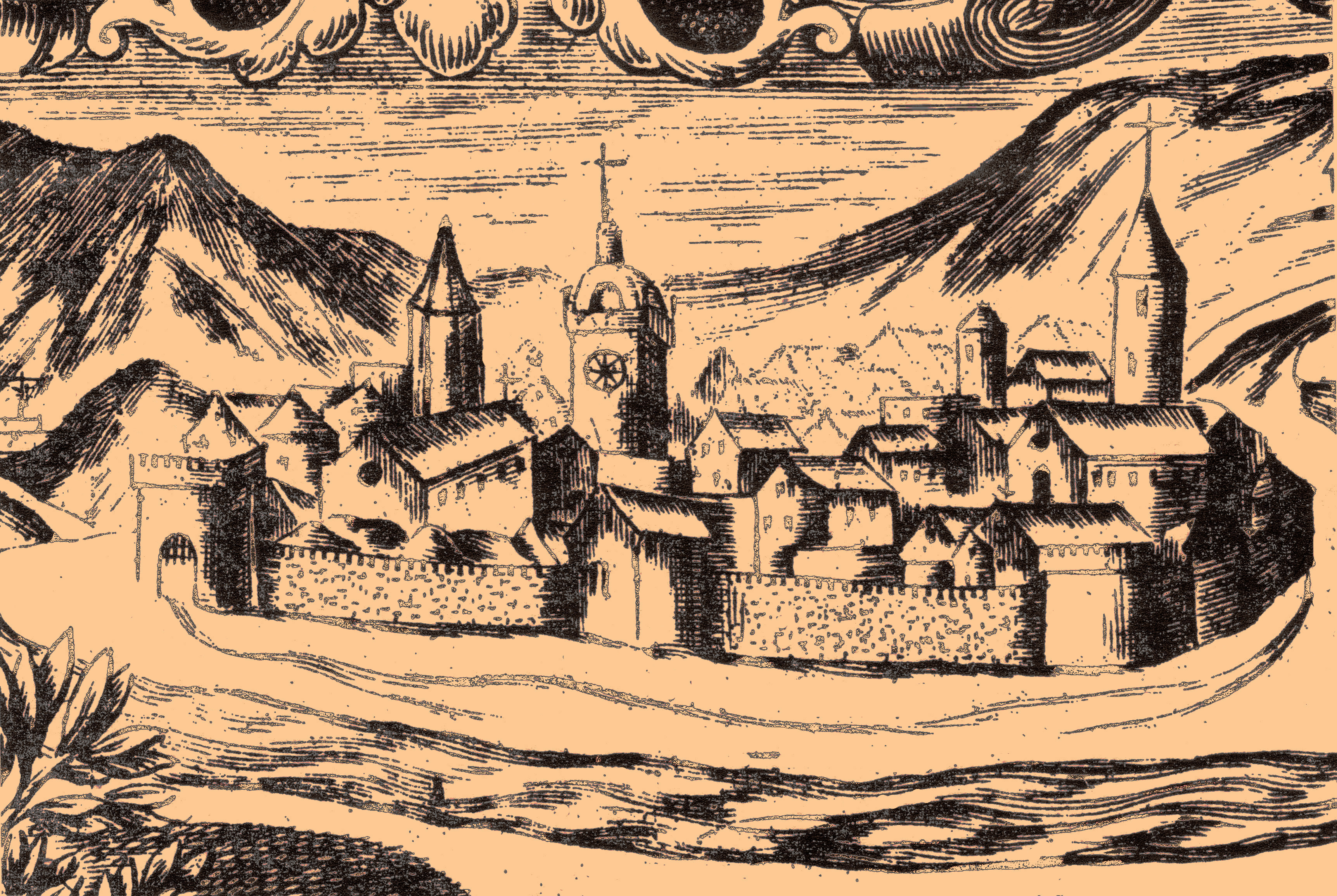 Apt gravure de Sarret vers 1615 1620